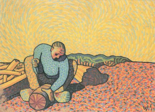 Wilhelm Morgner: Der Holzarbeiter, 1911, Öl auf Leinwand, 143 x 197,5 cm, Stadt Soest, Kunstmuseum Wilhelm-Morgner-Haus